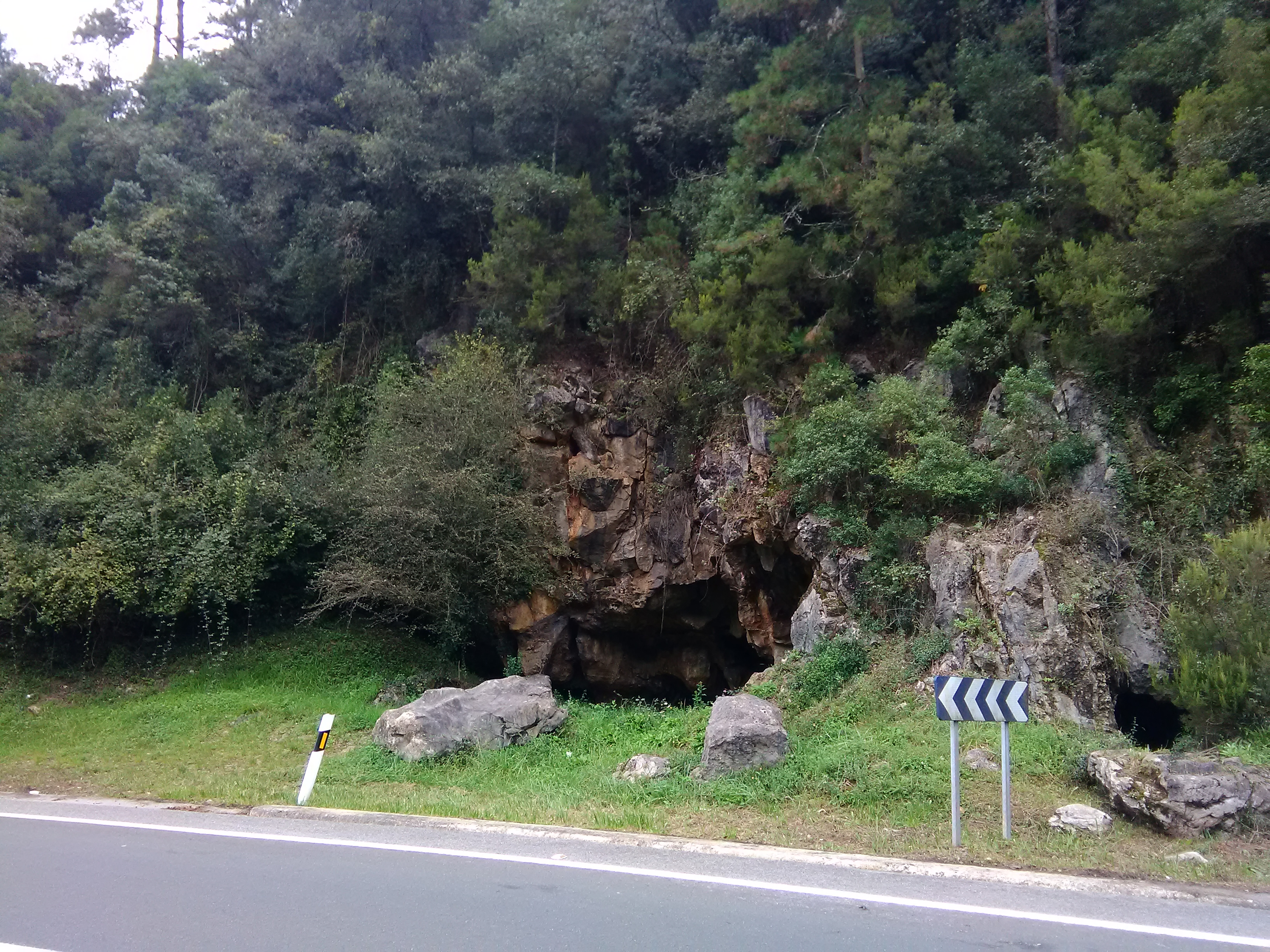 Cueva de Armiña (Boca superior del Sistema de las Lamiñas). Amoroto (Vizcaya).